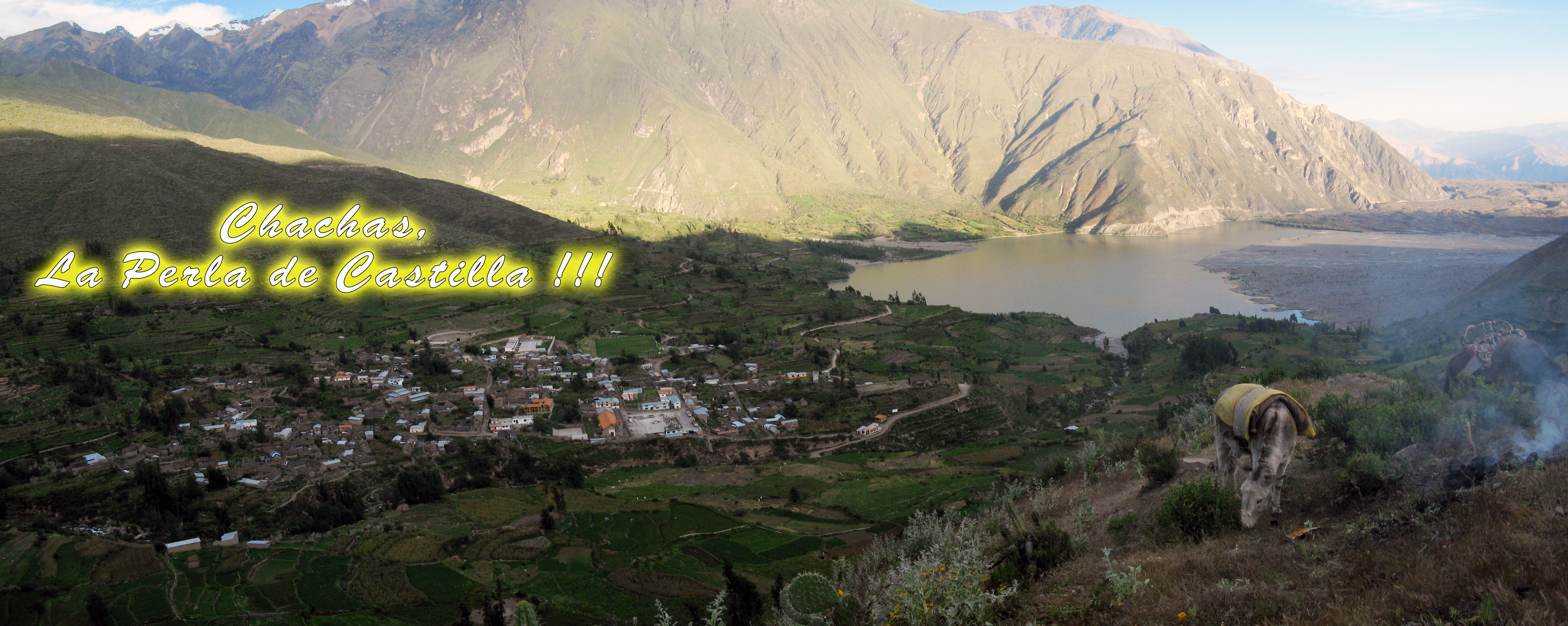 Foto panorámica del pueblo de Chachas. Se aprecia su hermosa laguna